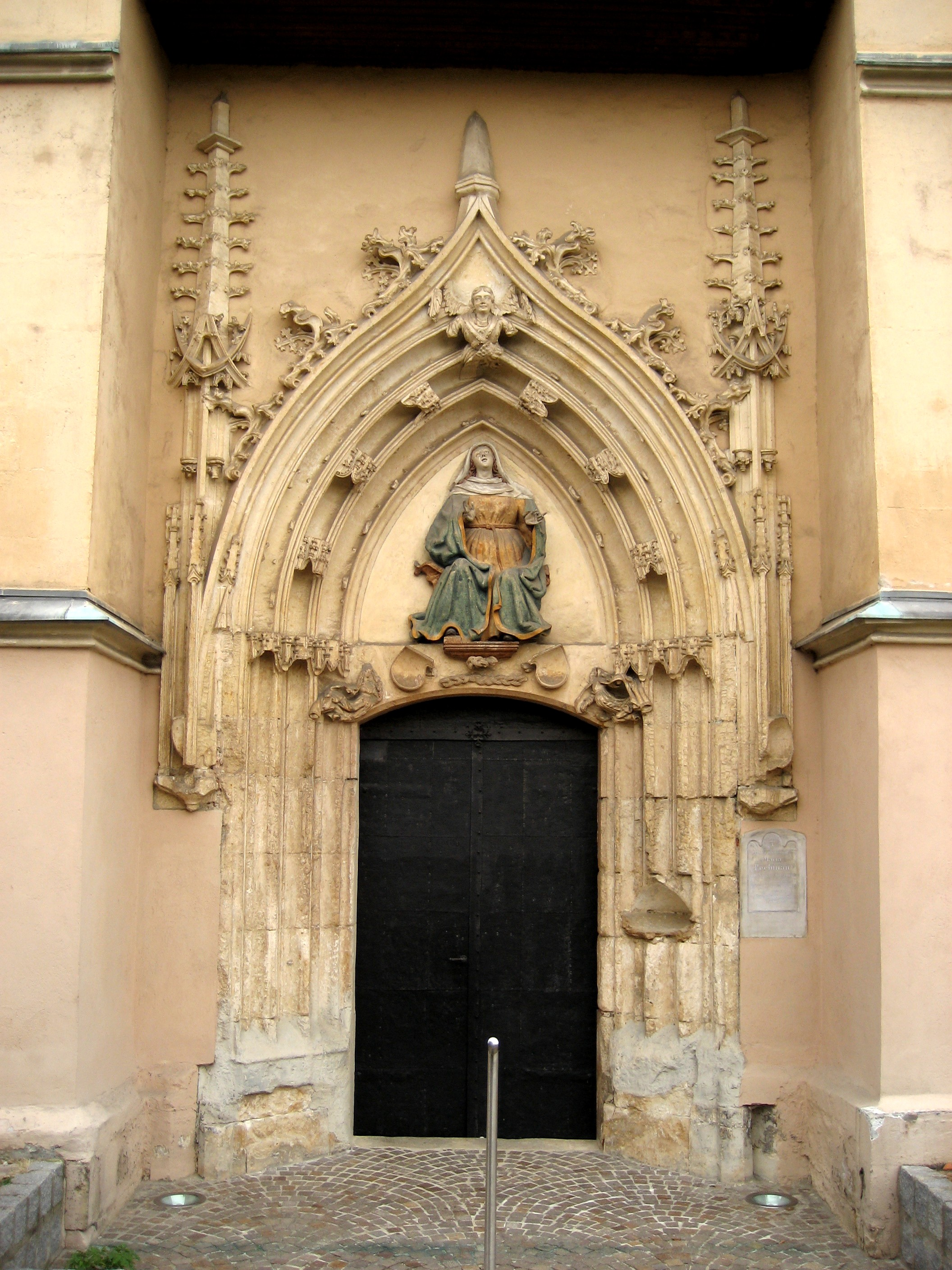 Wallfahrtskirche Maria Trost in Fernitz, Steiermark, Österreich / Church Maria Trost in Fernitz, Styria, Austria